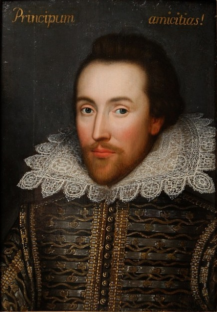 Retrato de hombre hacia 1610, atribuido a William Shakespeare